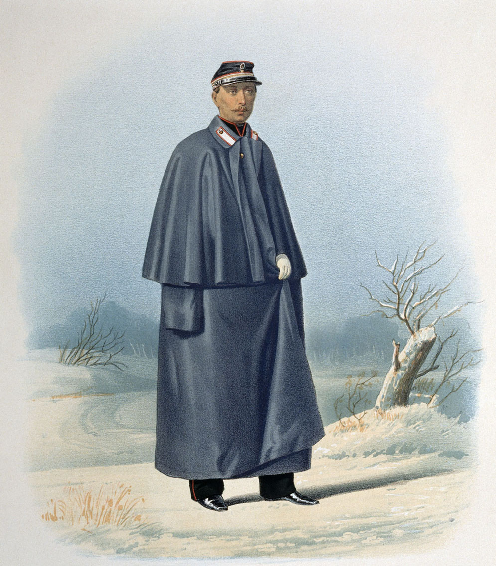 Обер-офицер Л.-Гв. Измайловского полка (в шинели) 30 апреля 1864.